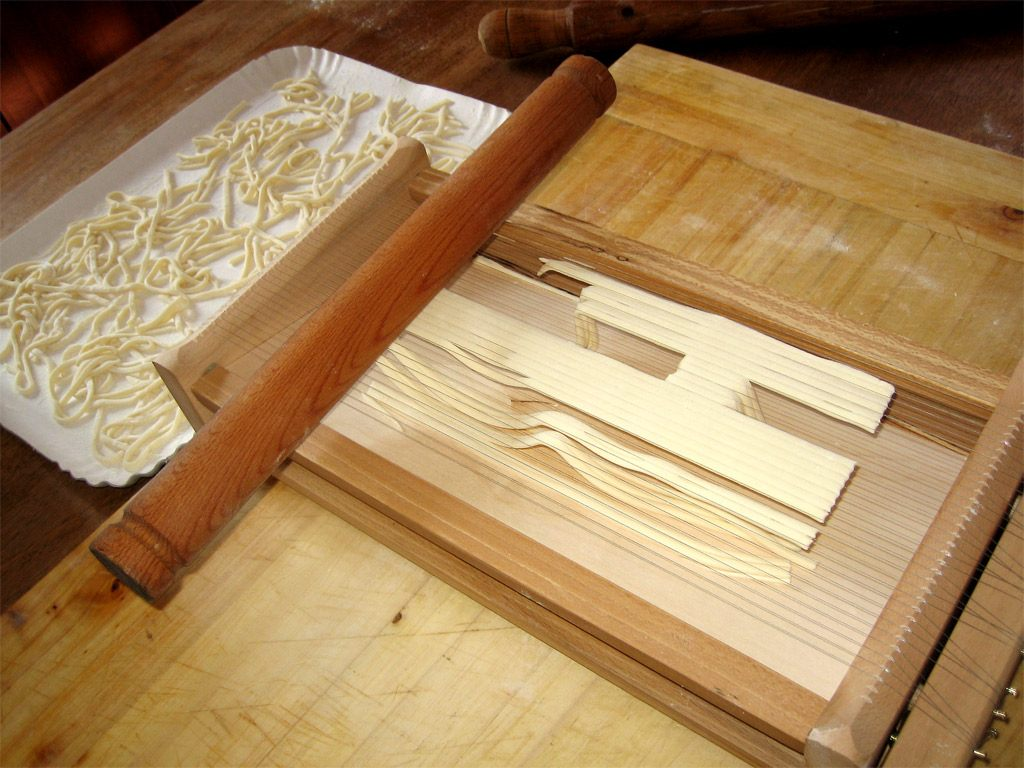 Gli strangozzi sono una pasta lunga a sezione quadrata o rettangolare, tipica dell'Umbria - Italia.